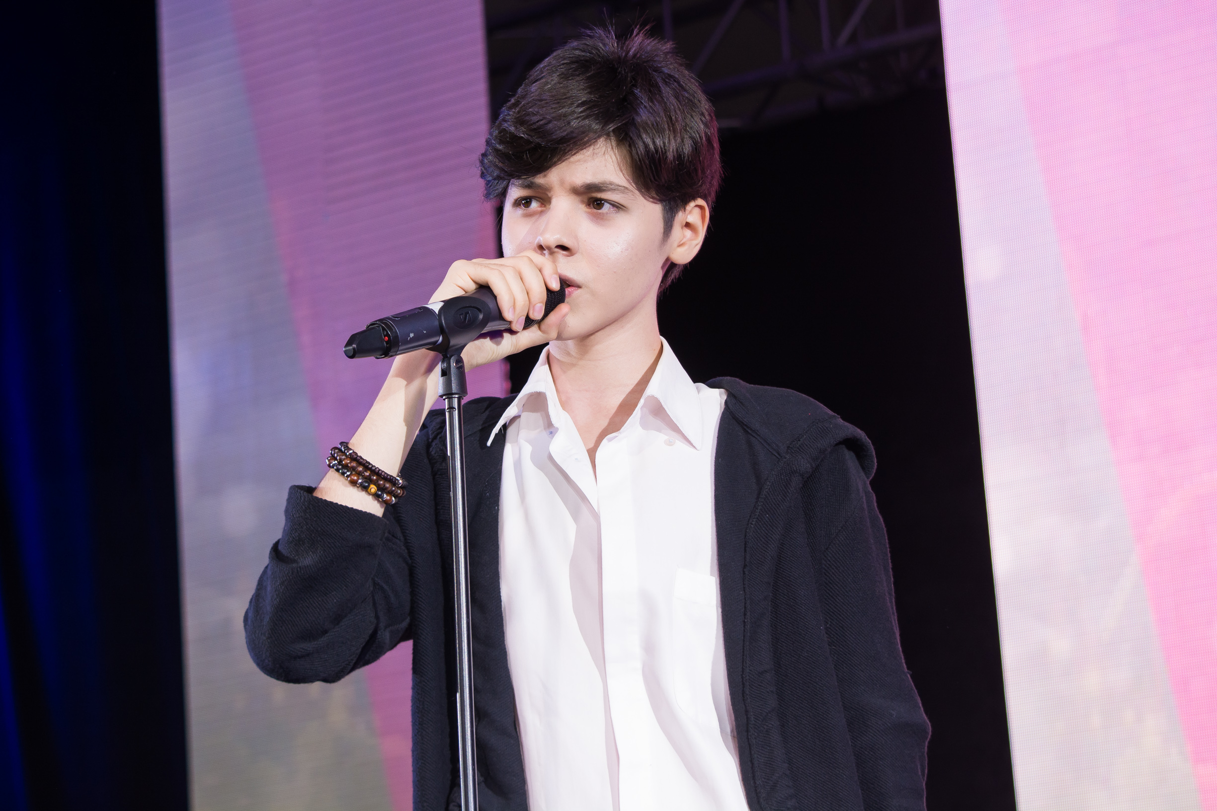 Выступление Кристиана Костова на слёте «Битва Талантов» в Сочи 5 мая 2016 года